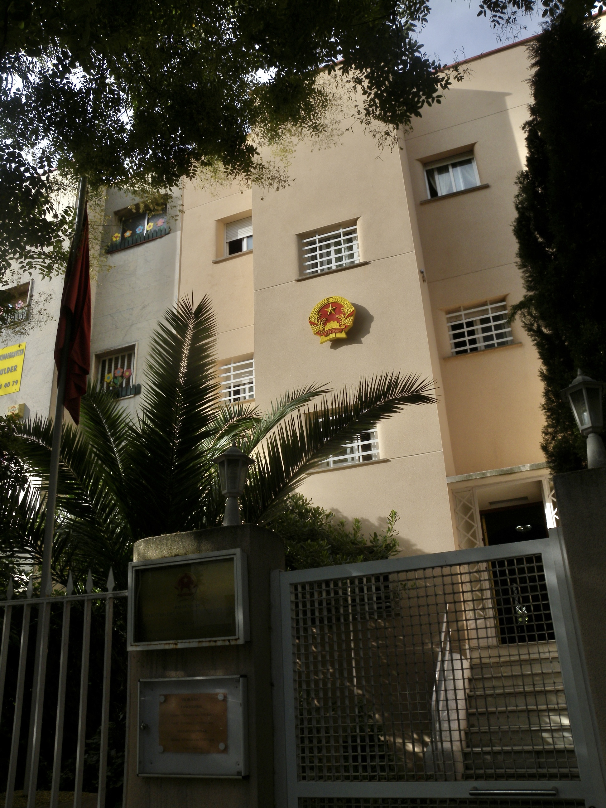 Embajada de la República Socialista de Vietnam